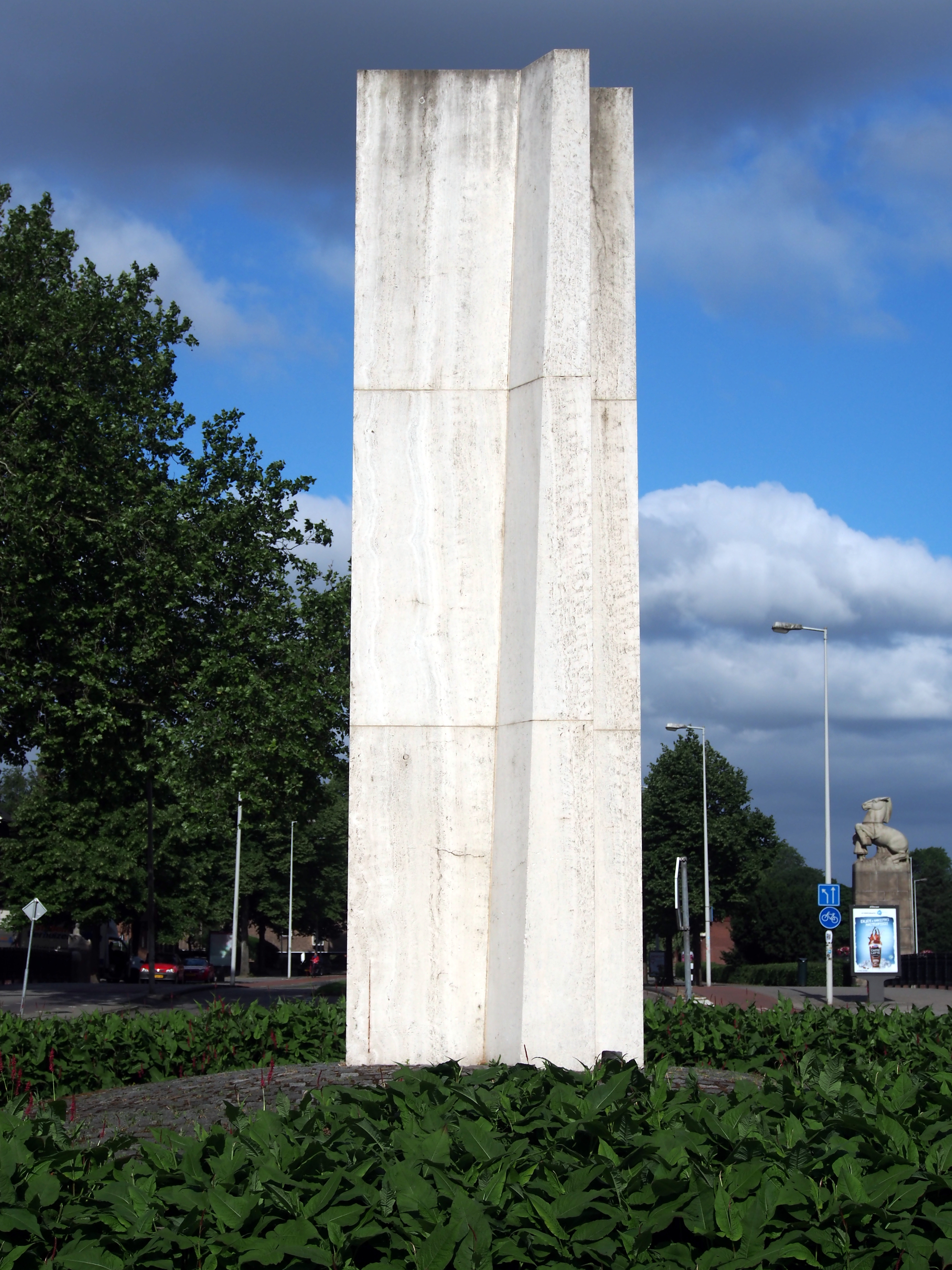 Photographed in Amsterdam. Plastiek van Ben Guntenaar; getiteld Verschuivingen